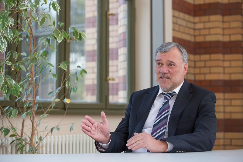 Template:போட்ச்டம் தட்ப வெப்ப தாக்க ஆராய்ச்சி நிறுவனத்தில் ஜுர்கென் குர்த்ஸ்